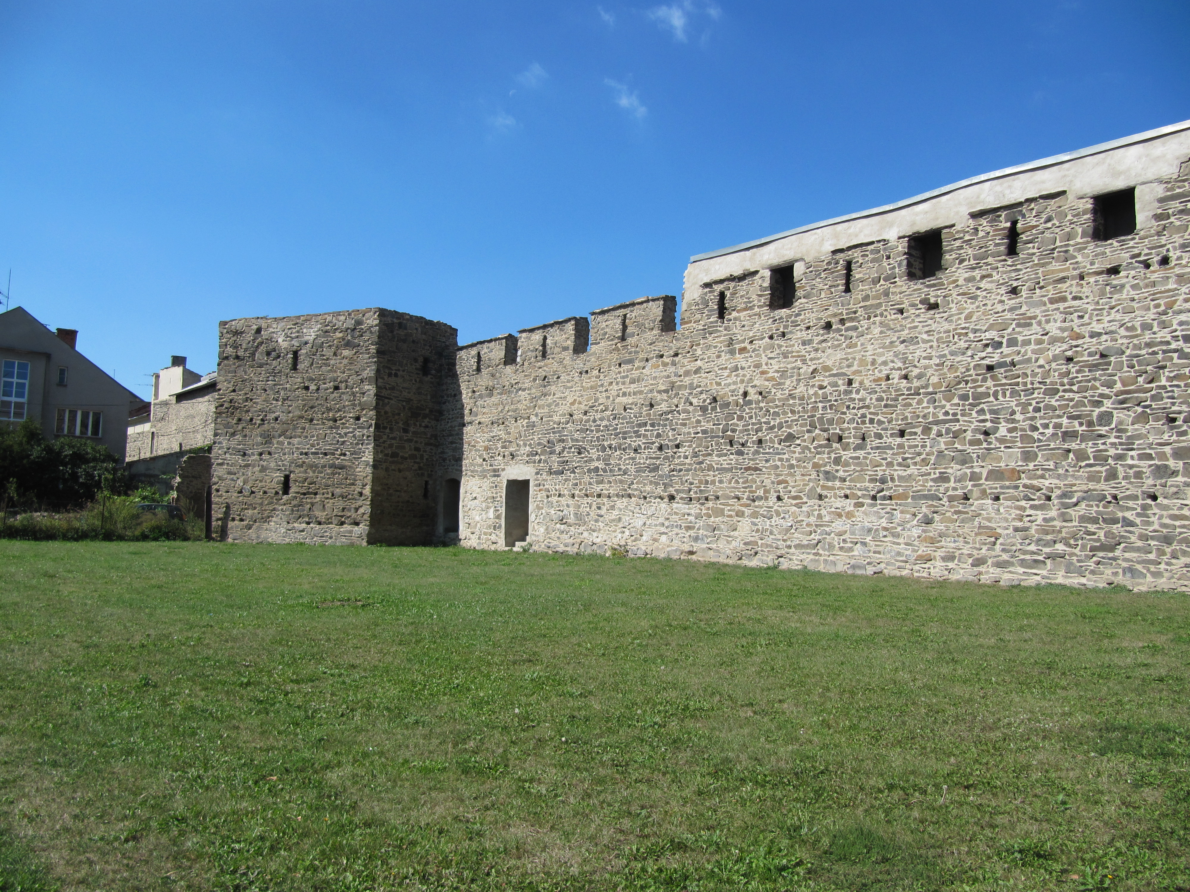 Městské opevnění (Lipník nad Bečvou), Lipník nad Bečvou